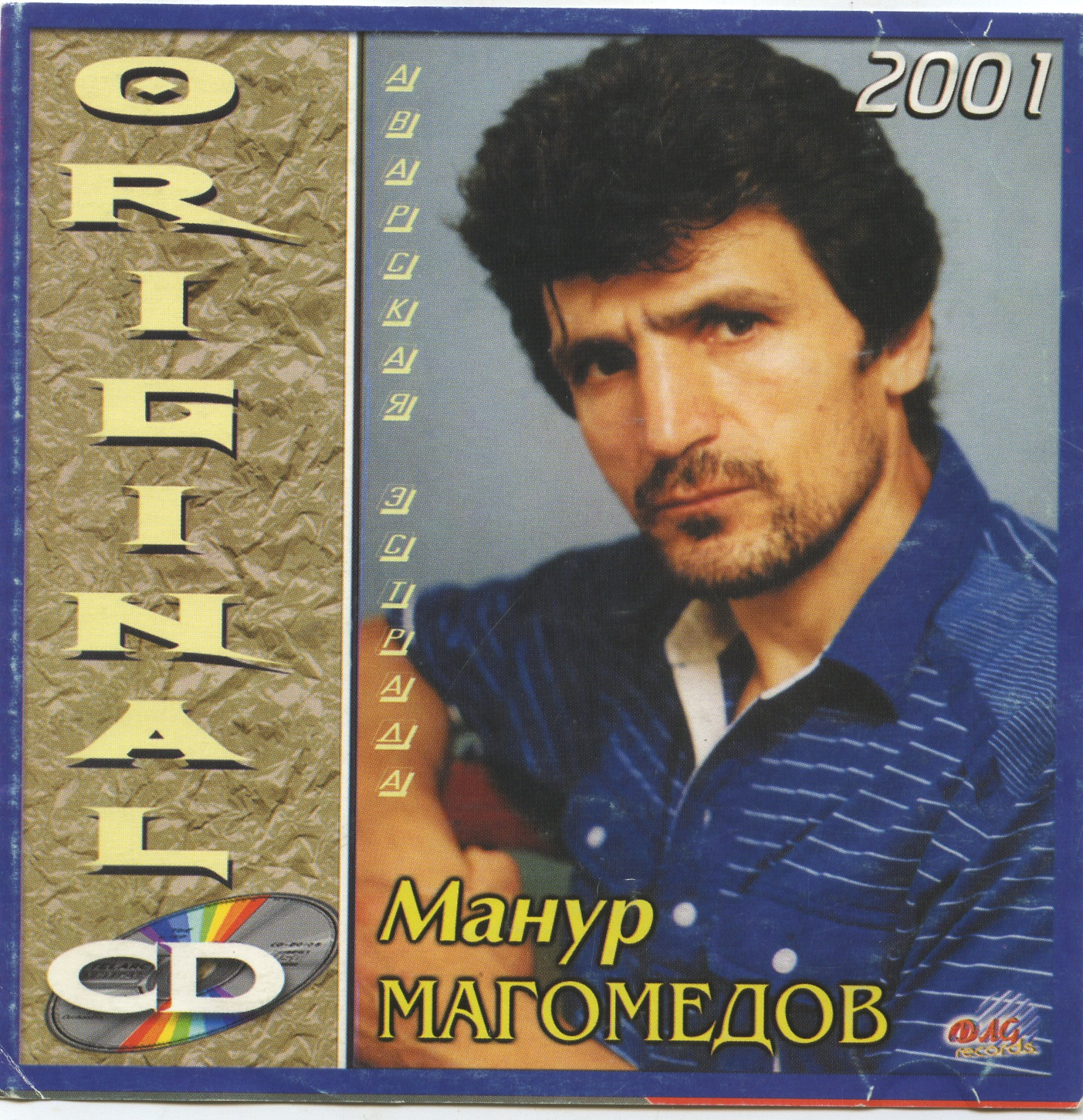 Личное фото на альбом - 2001